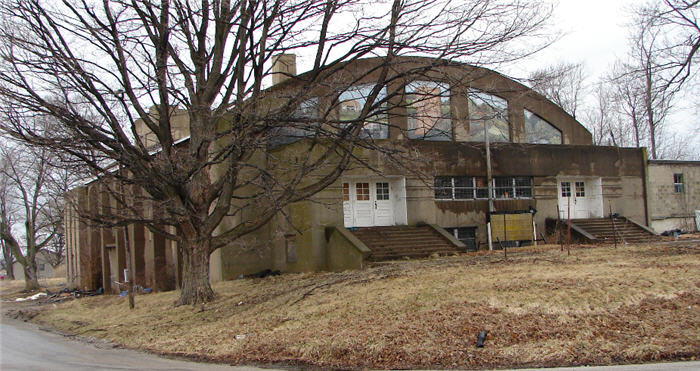 Alamo, Indiana